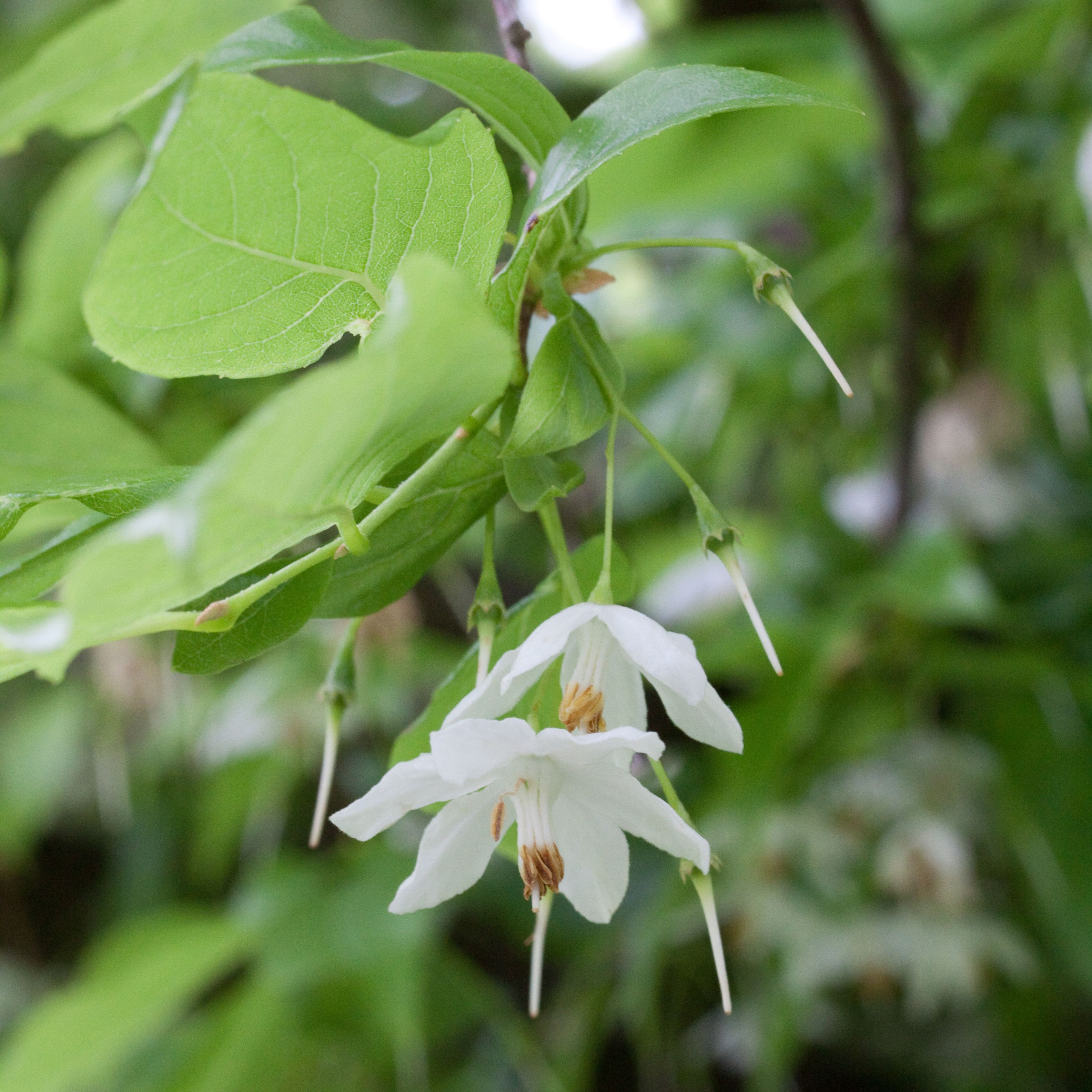 Fleurs de Sinojackia xylocarpa - Jardin botanique de Strasbourg